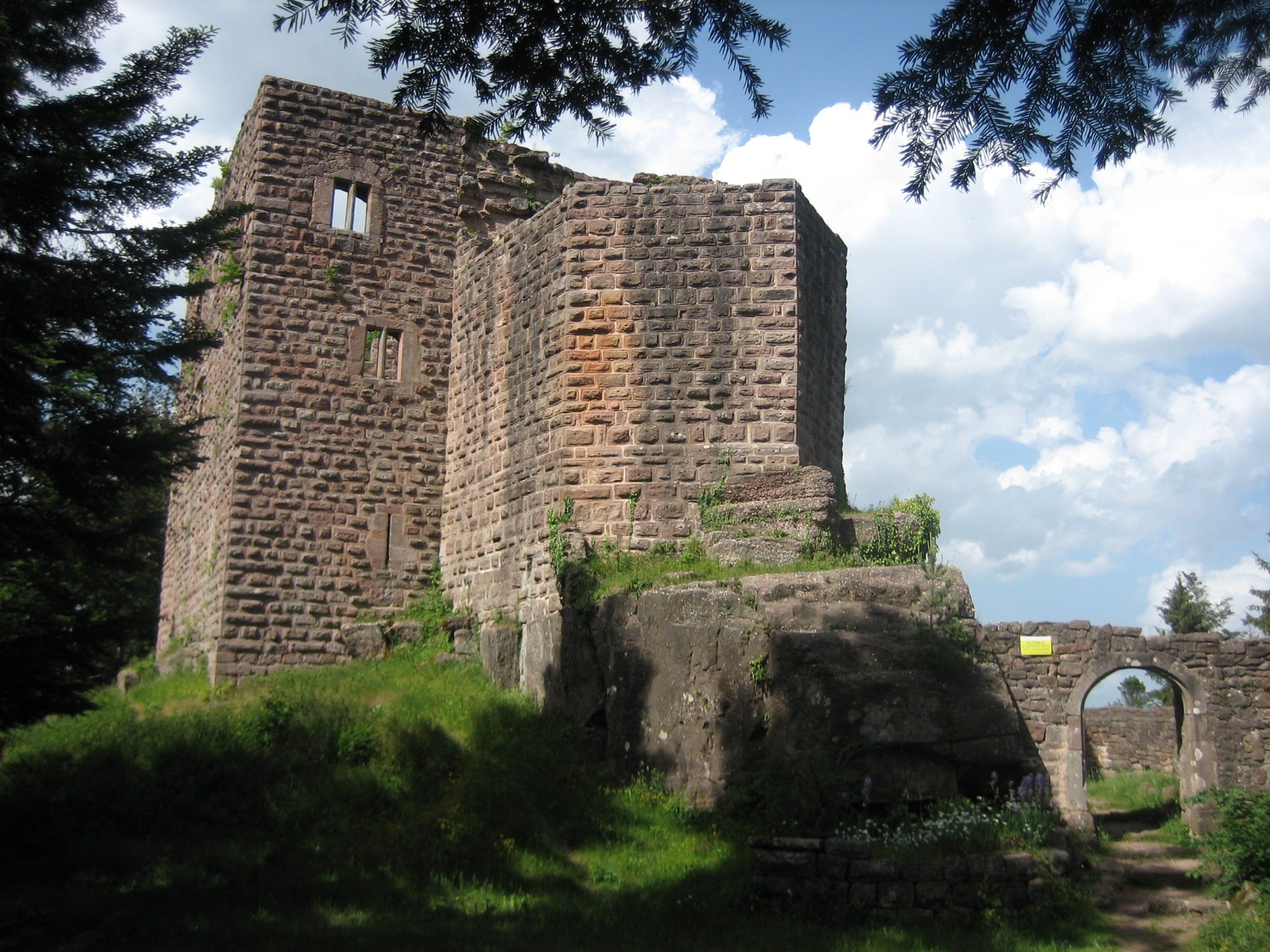 Château du Birkenfels dans la forêt d'Obernai (France)